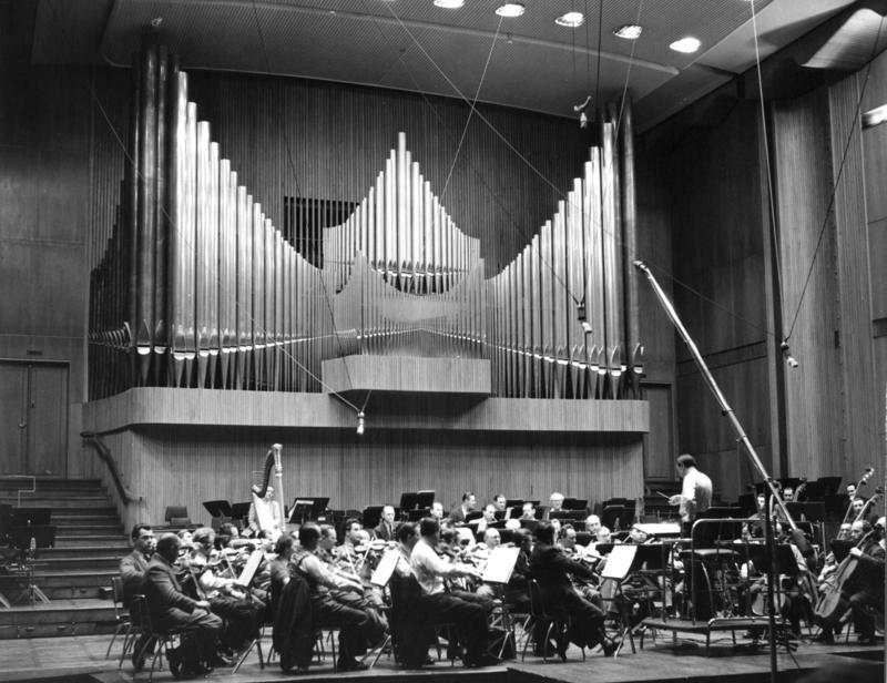 Funkhaus Köln: Großer Sendesaal des Rundfunkhauses in Köln. Prof. Hans Rosbaud während einer Probe mit dem Sinfonie-Orchester des Hauses.